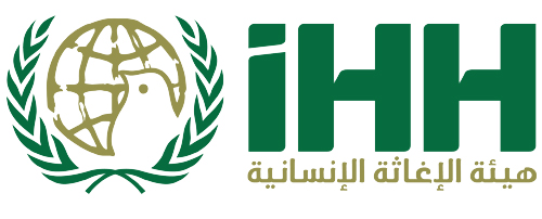 العلامة التجارية (لوجو) لهئية الإغاثة الإنسانية IHH